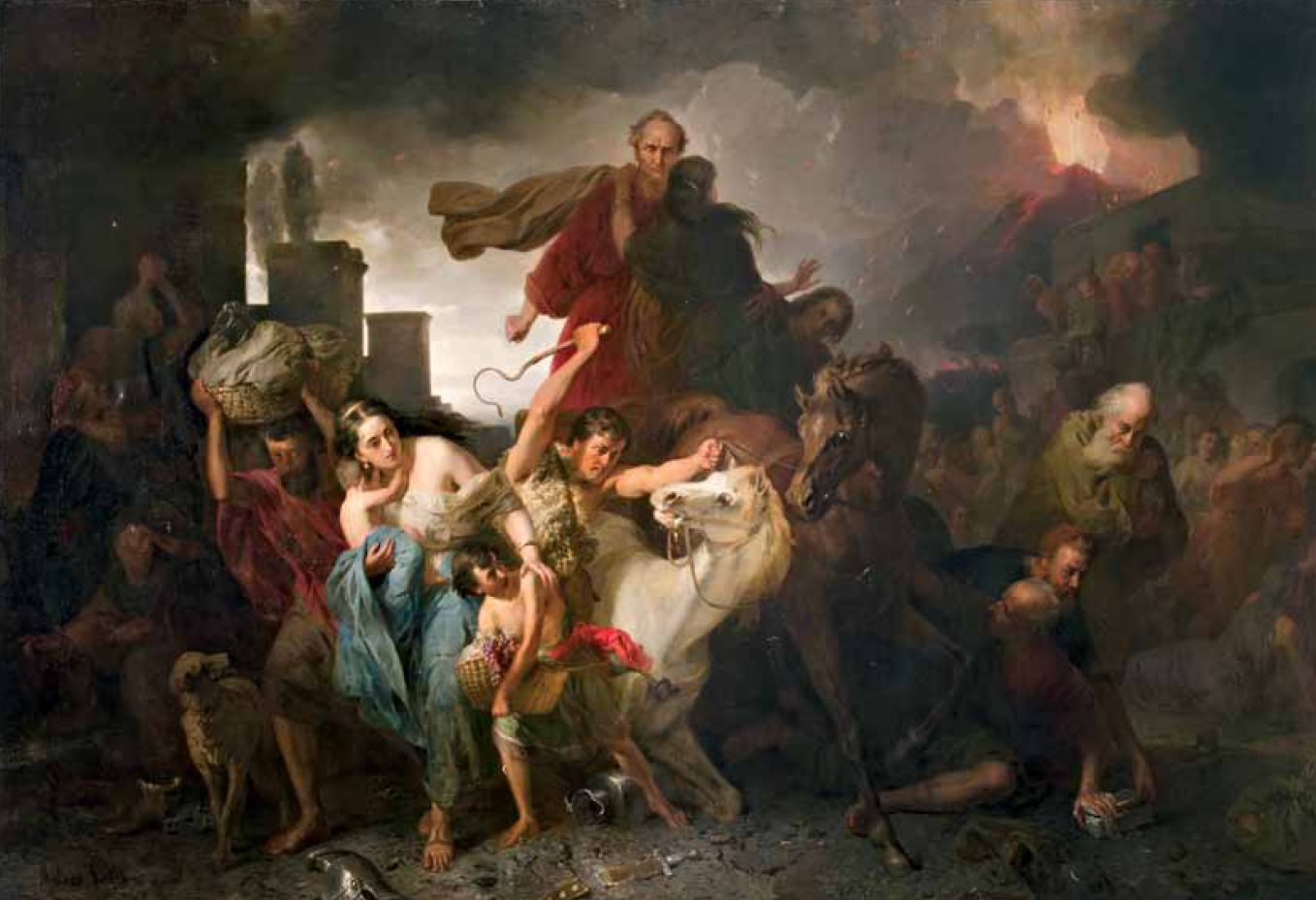 Título de la obra: Destrucción de Pompeya (Peligro en Pompeya). Óleo sobre tela ejecutado en el año 1876 por el pintor húngaro József Molnár (1821-1899).